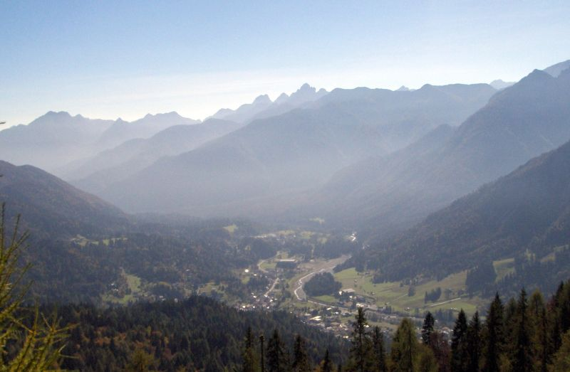 Forni di Sopra (UD - Friuli-Venezia Giulia - Italy) panorama dal Varmost